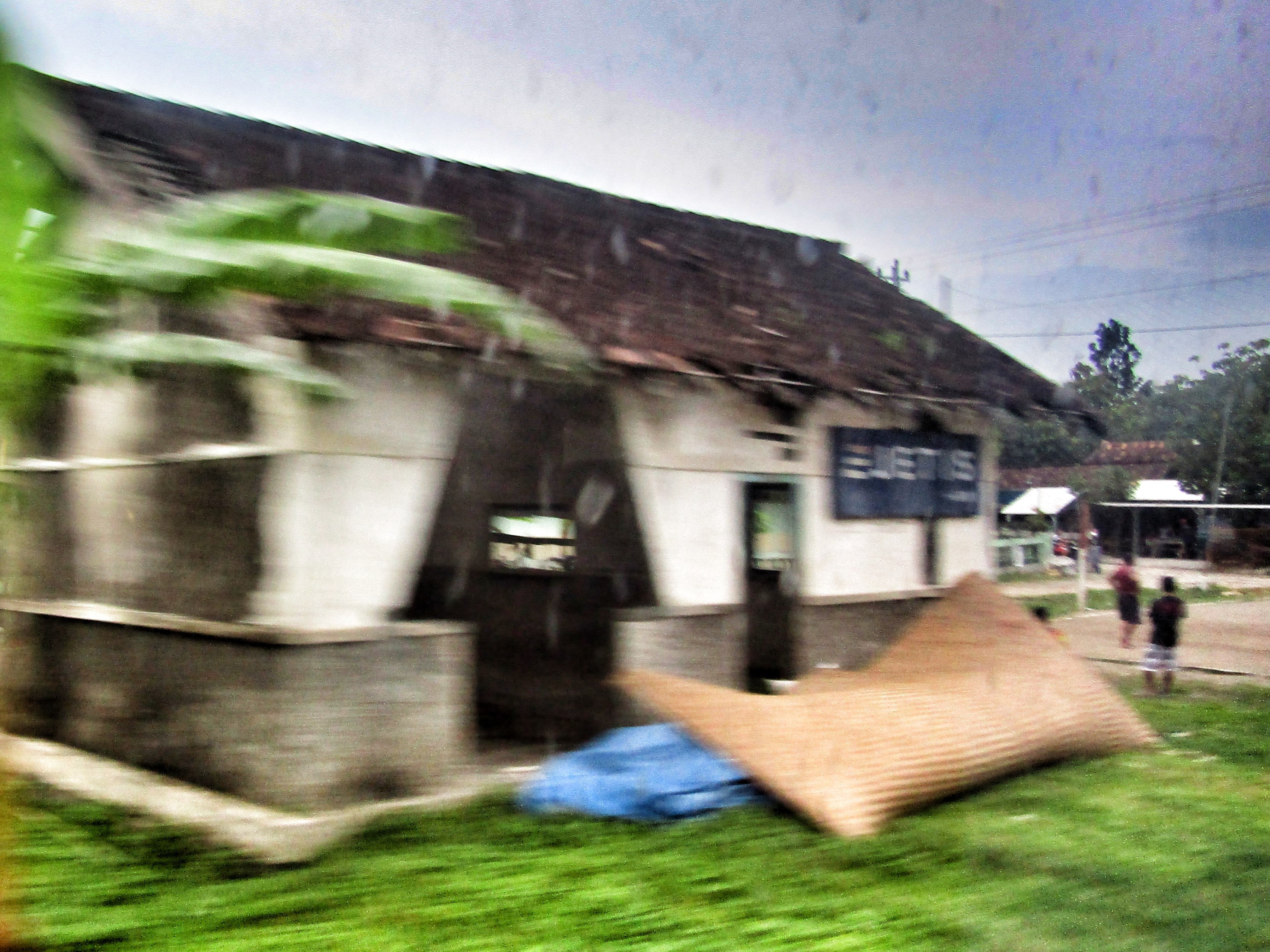 Halte Jetis, 2019